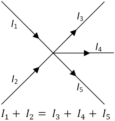 Kirchhoff's current law